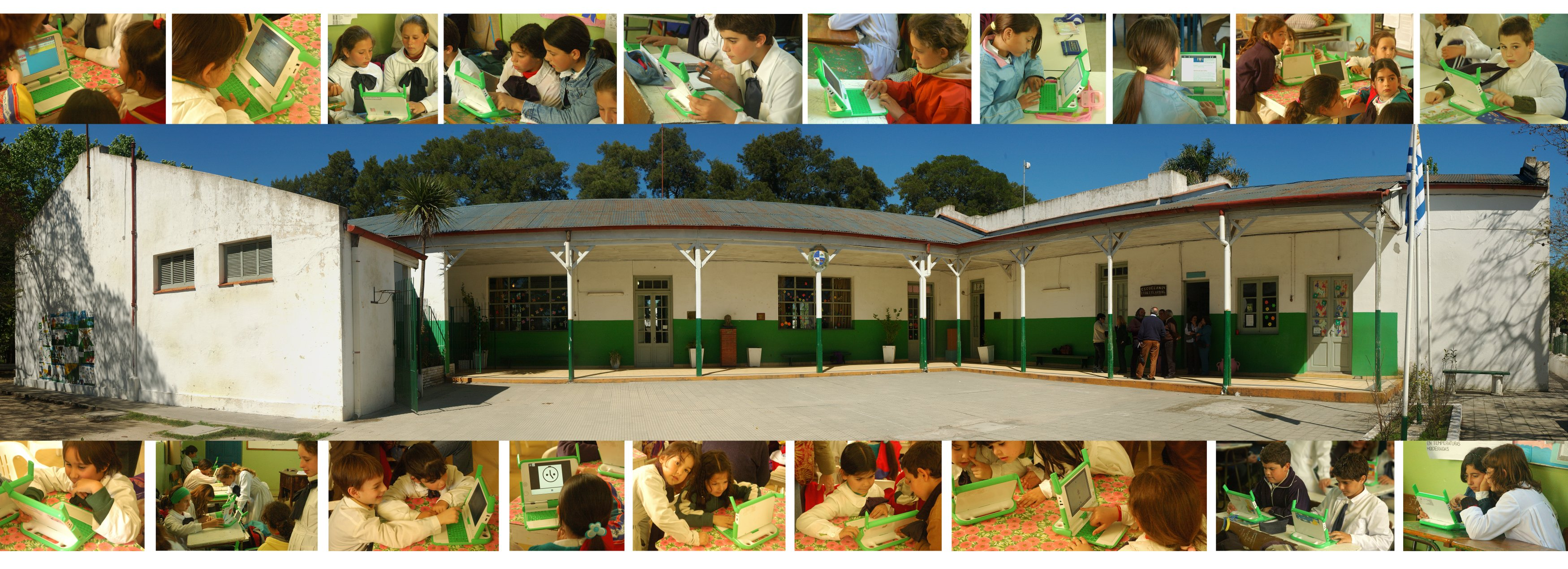 Proyecto CEIBAL (OLPC): panorama de la escuela de Cardal (Departamento de Florida, Uruguay) y fotos de los niños con la máquinas.